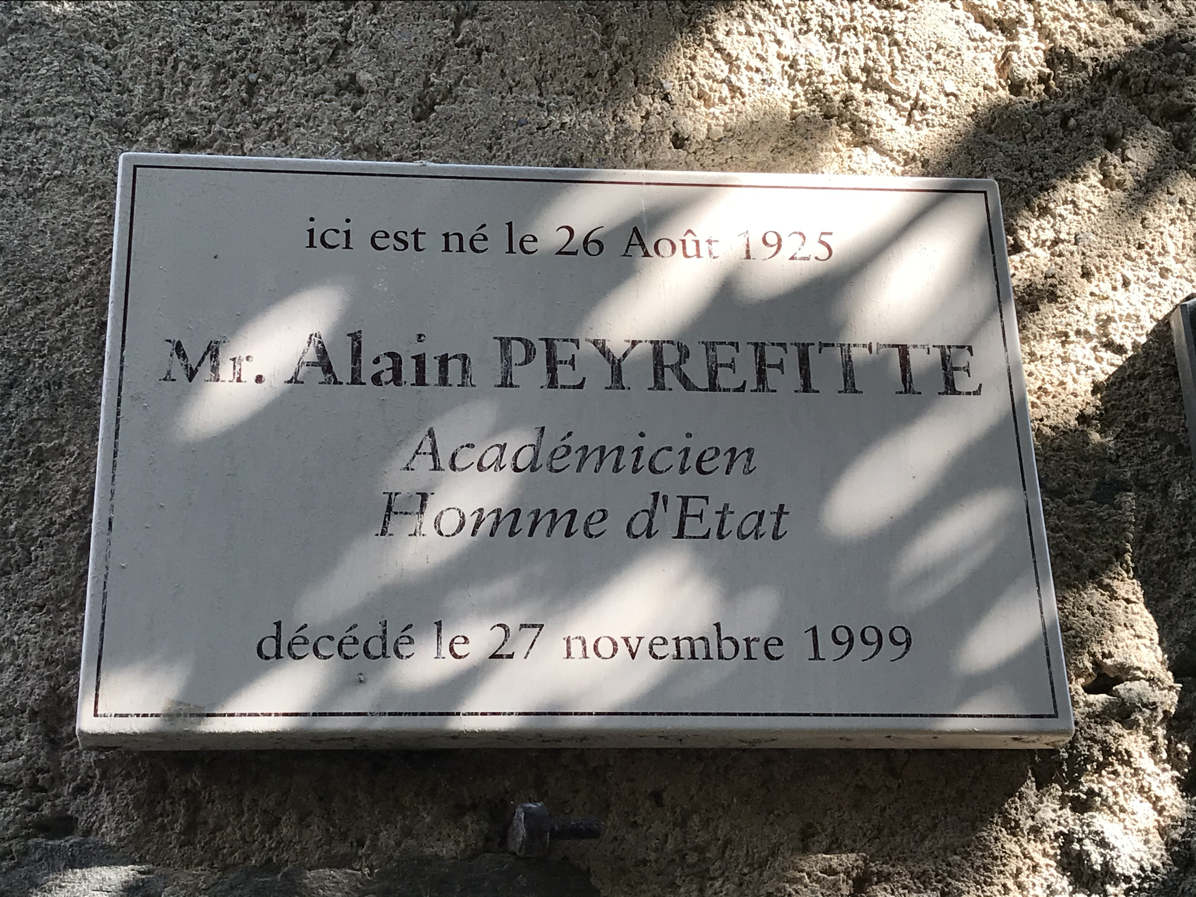 Maison natale de Alain Peyrefitte